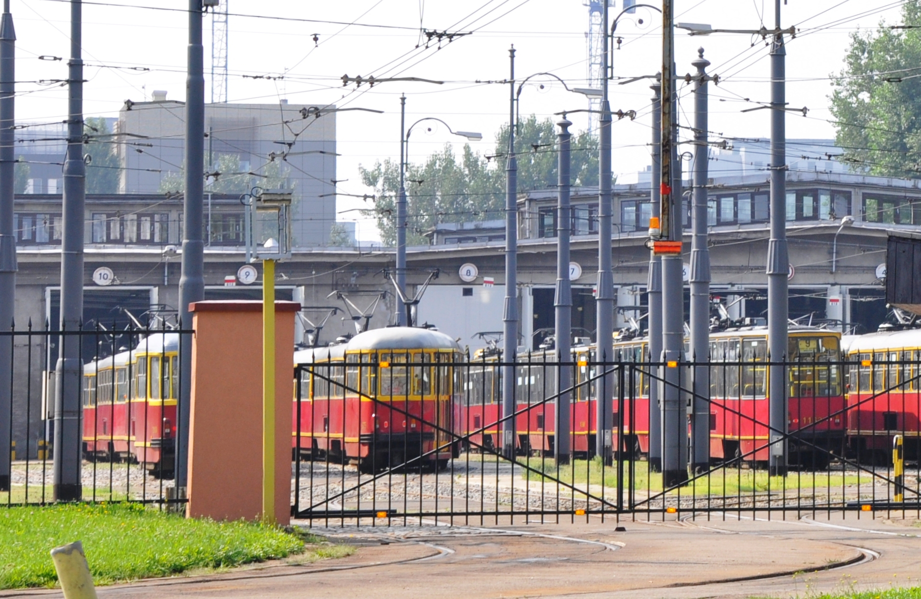 Warschau, Jana Pawla Woronicza.